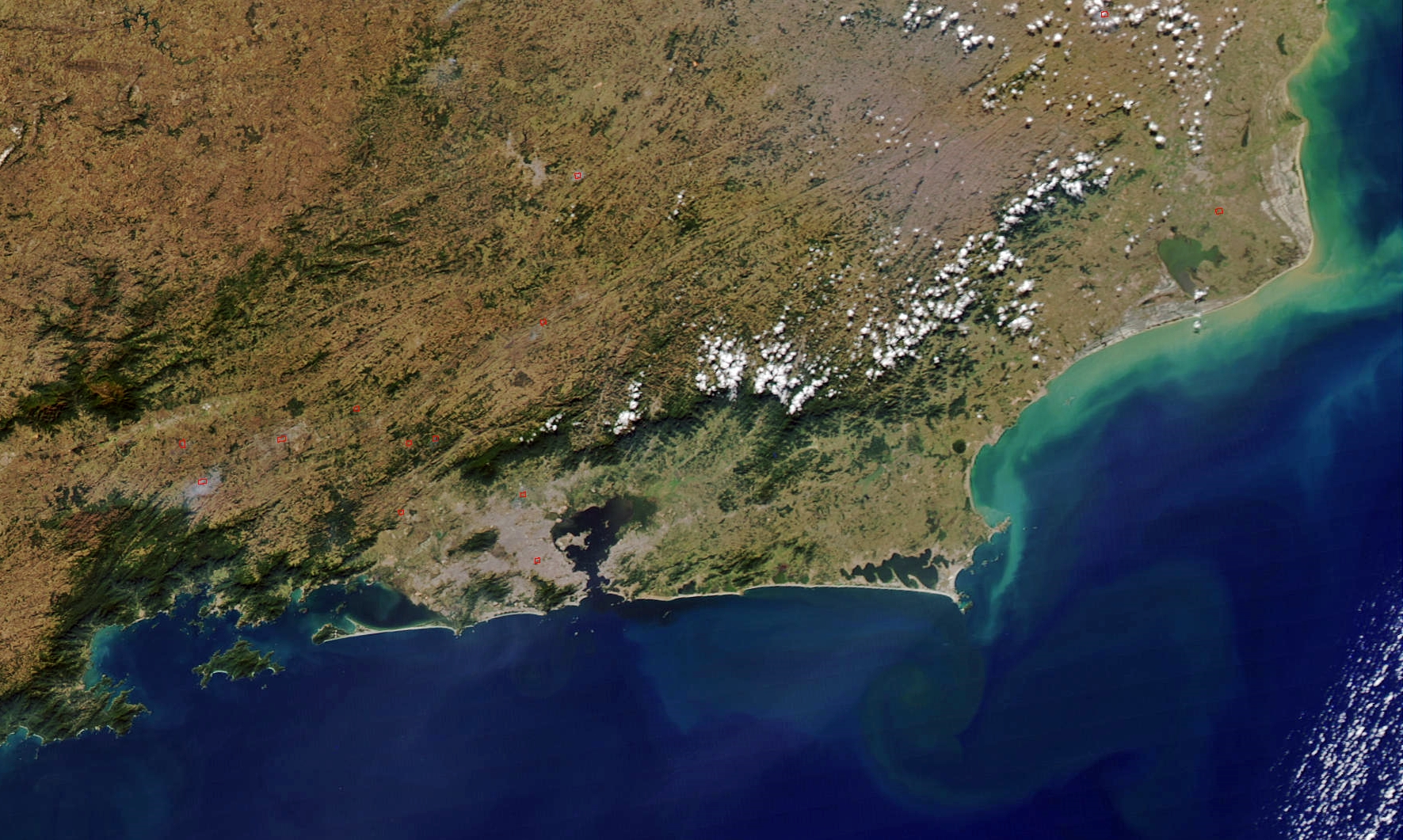 Imagem de satélite do estado do Rio de Janeiro